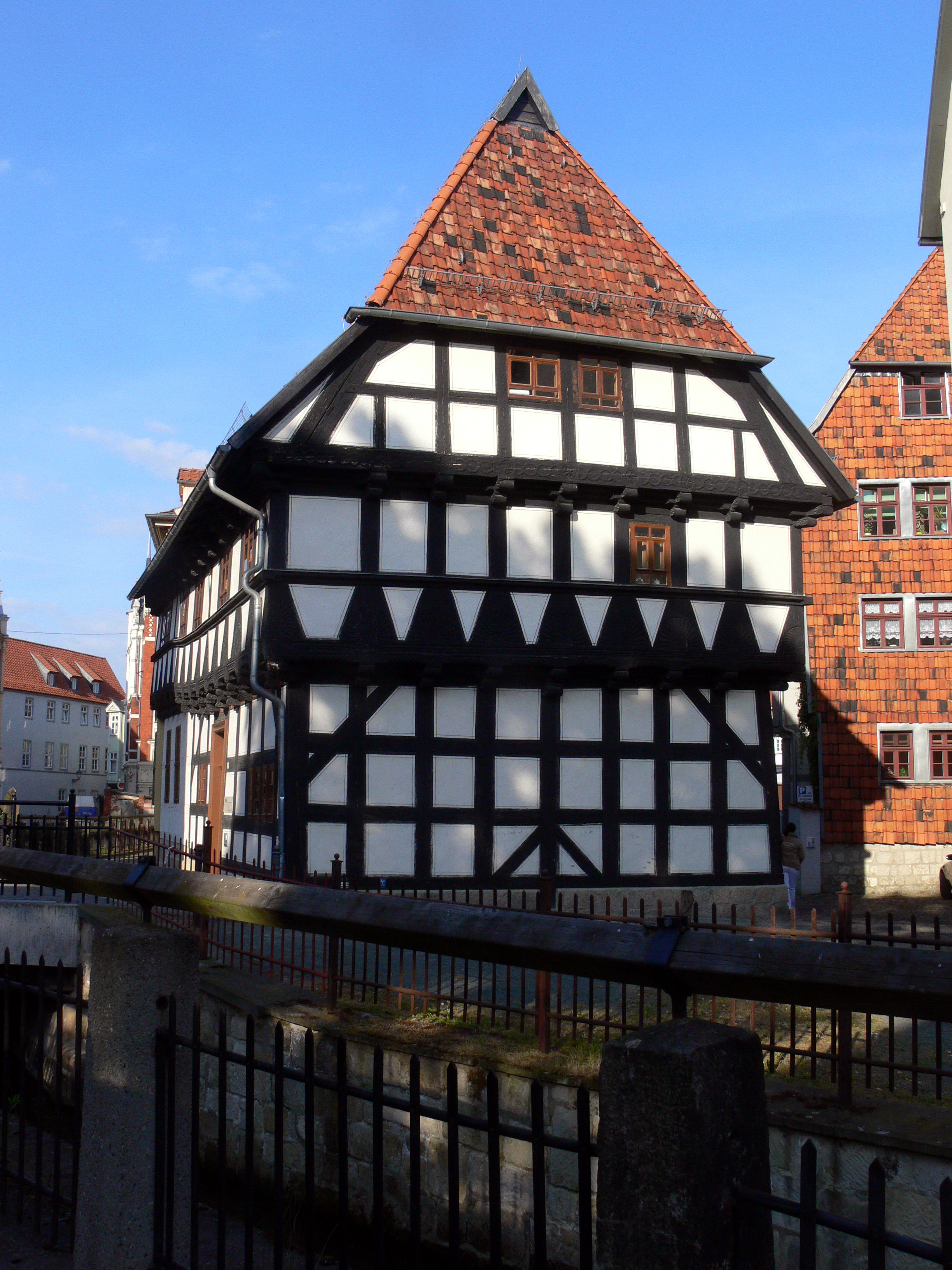 Fachwerkhaus in Quedlinburg. Word 3